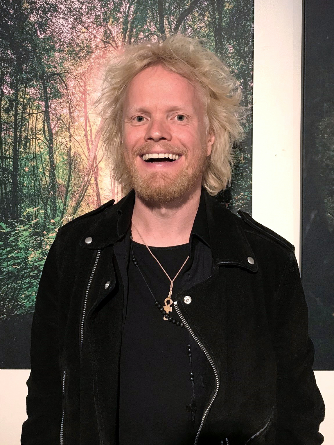 Ville Juurikkala Espoon kulttuurikeskuksessa 3. syyskuuta 2019.